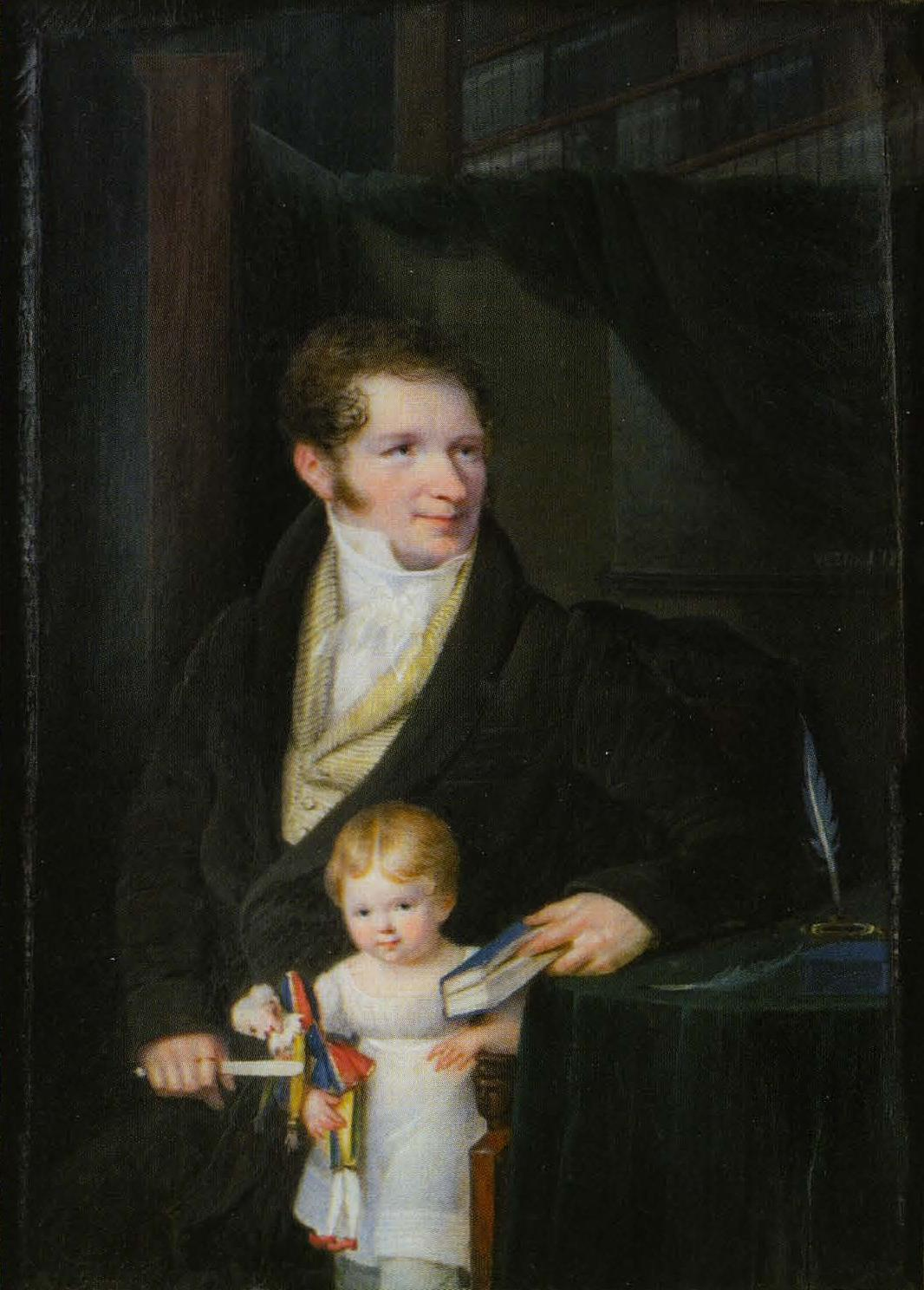 Фёдор Васильевич Самарин (1784-1853)с дочерью Марией (1821-1888), была замужем за графом Л.Соллогуб.